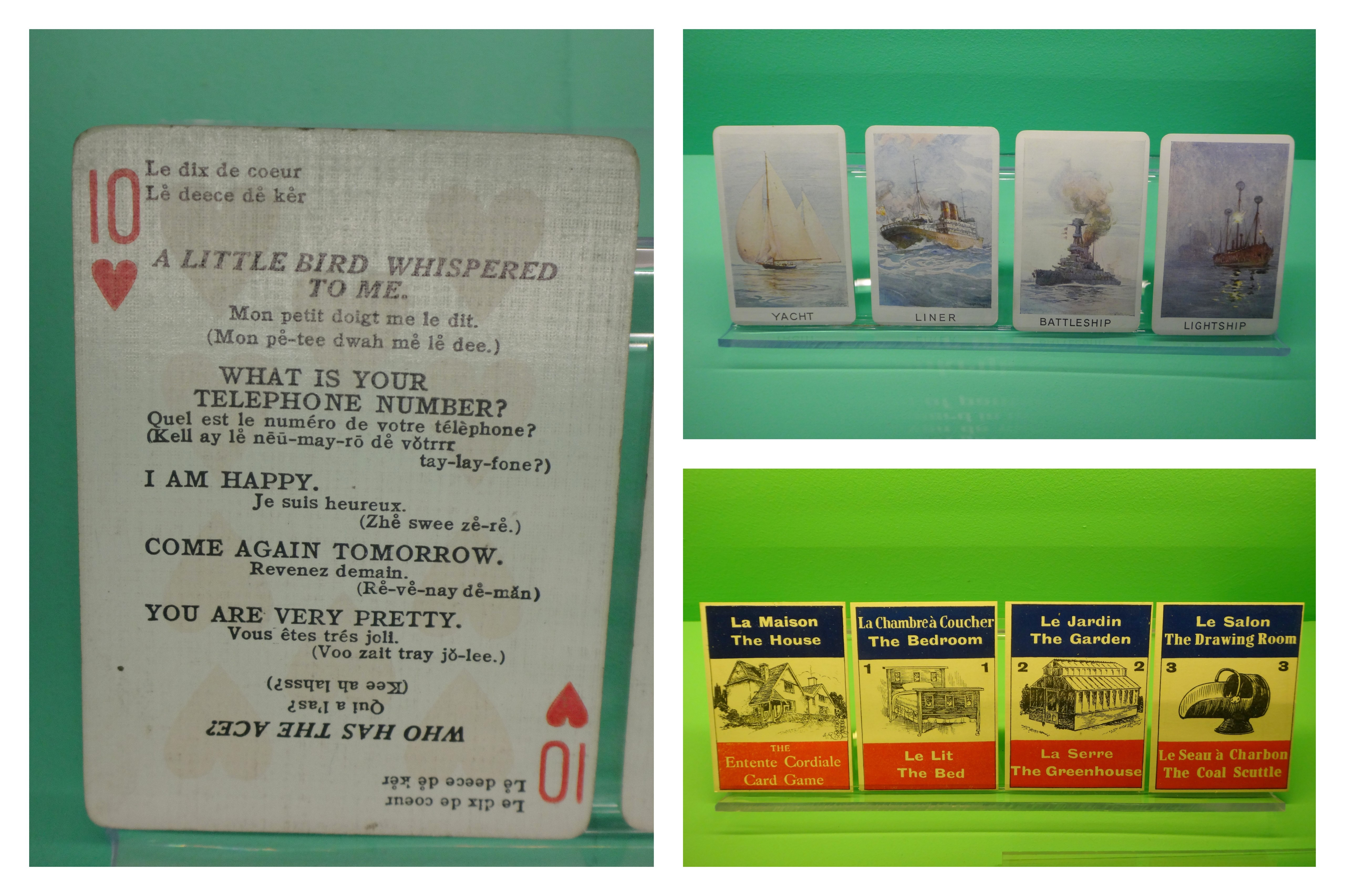 educatieve kaartspelen tijdens de Eerste Wereldoorlog